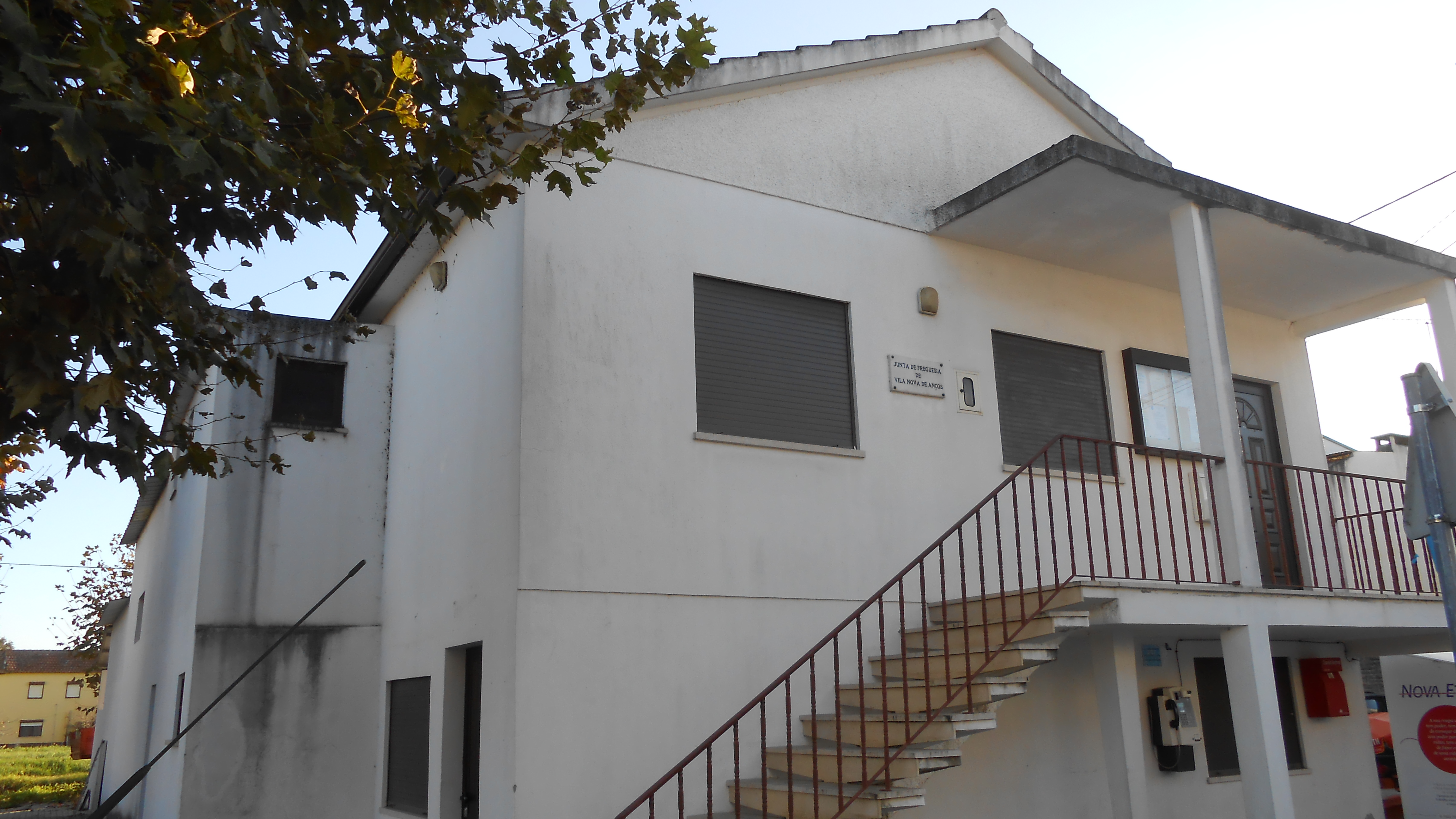 Die Gemeindeverwaltung in Junta Vila Nova de Anços, Kreis Soure, Portugal.